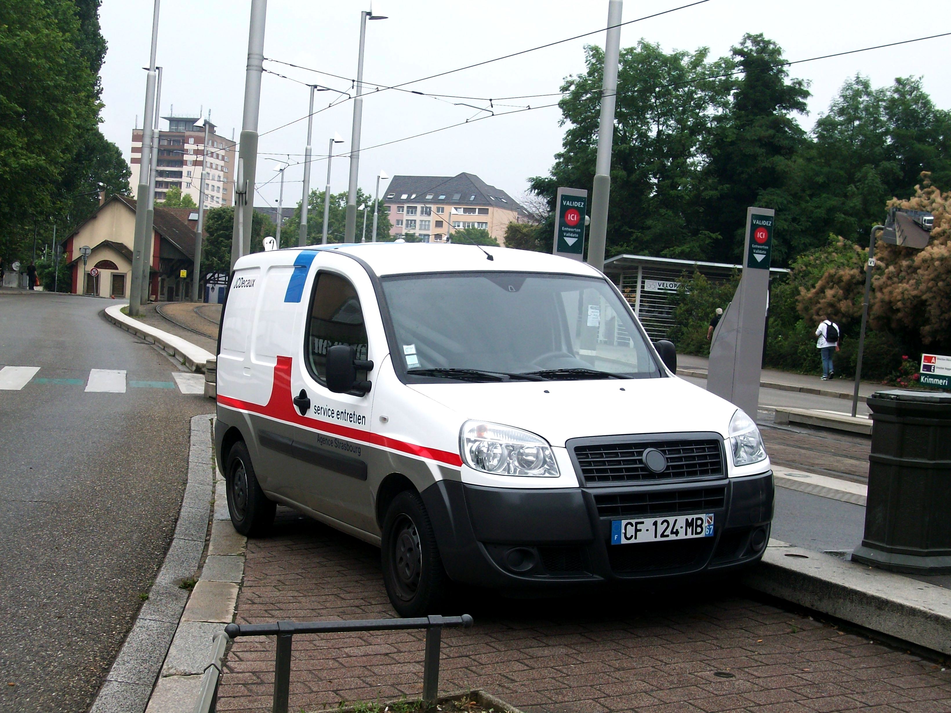 Camionette JC Decaux, station Krimmeri-Meinau - Strasbourg